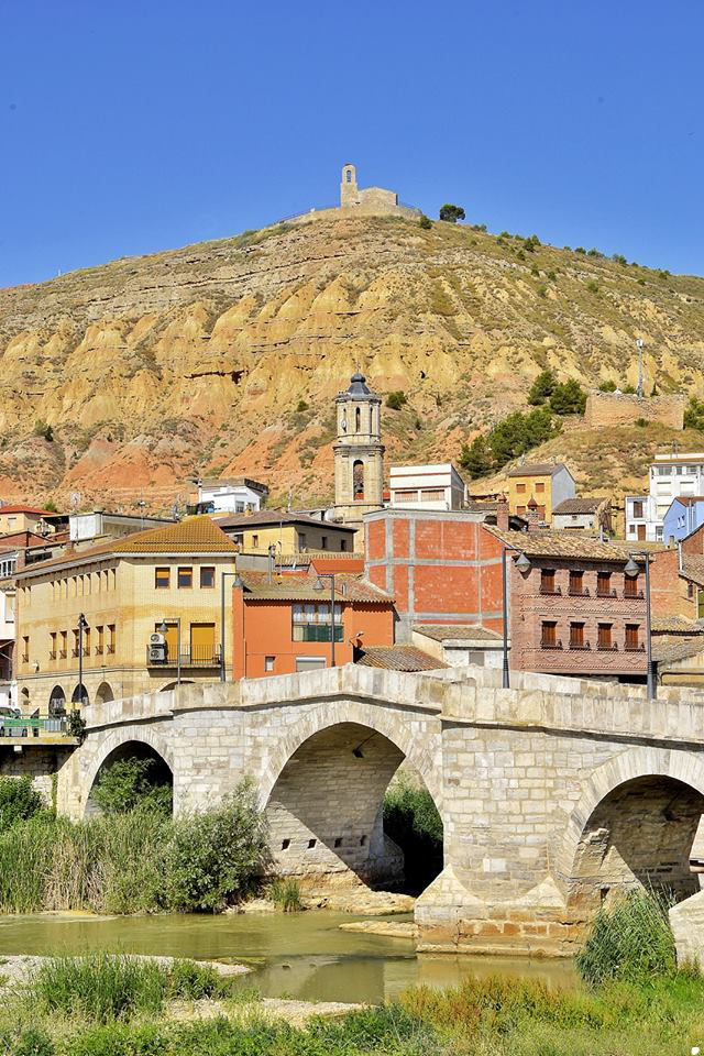 Ballobar